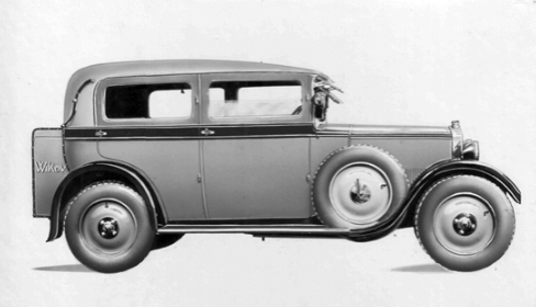 Wikov 7/28 (Auto, říjen 1929)